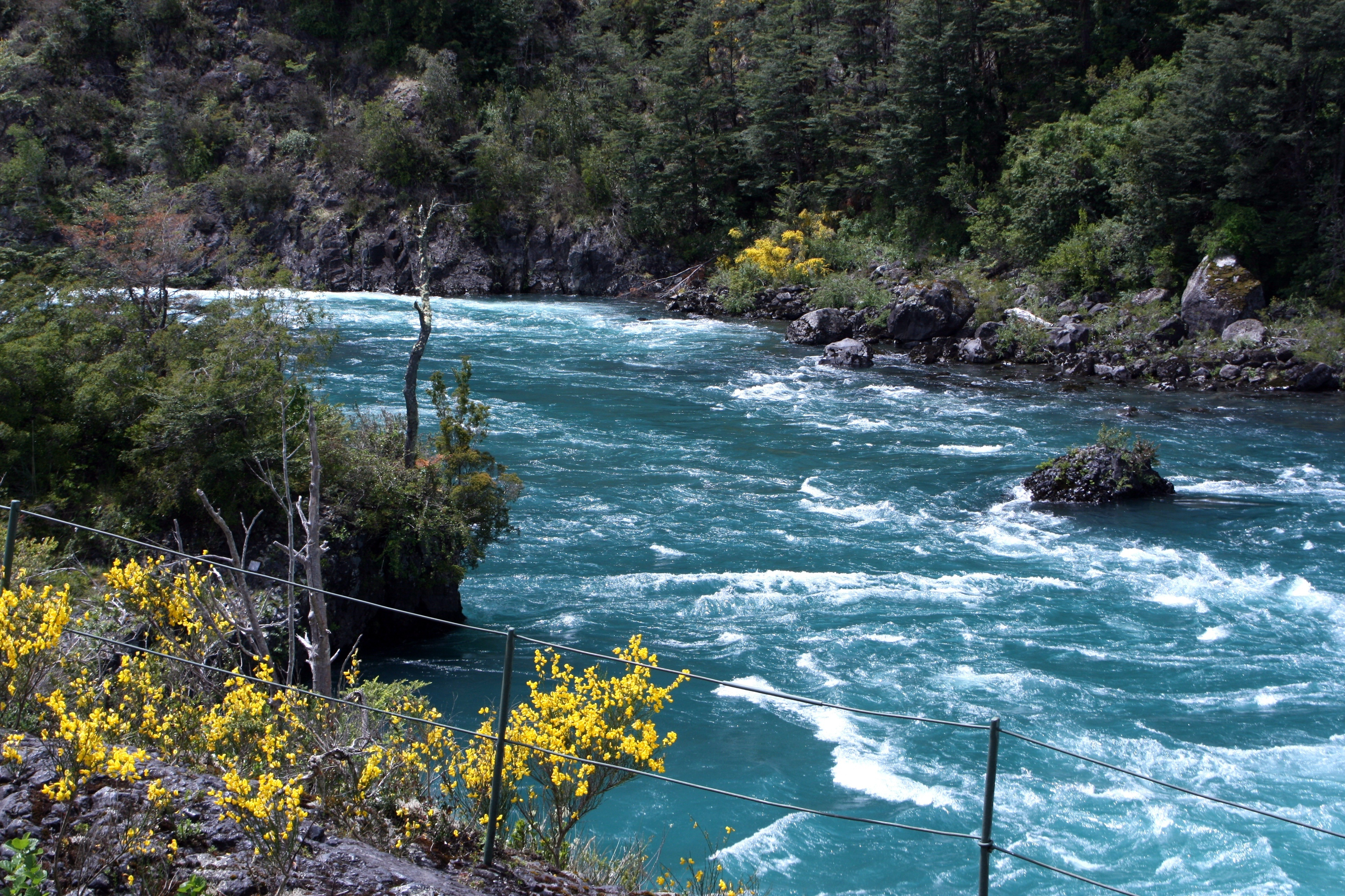 NP Vicente Pérez Rosales